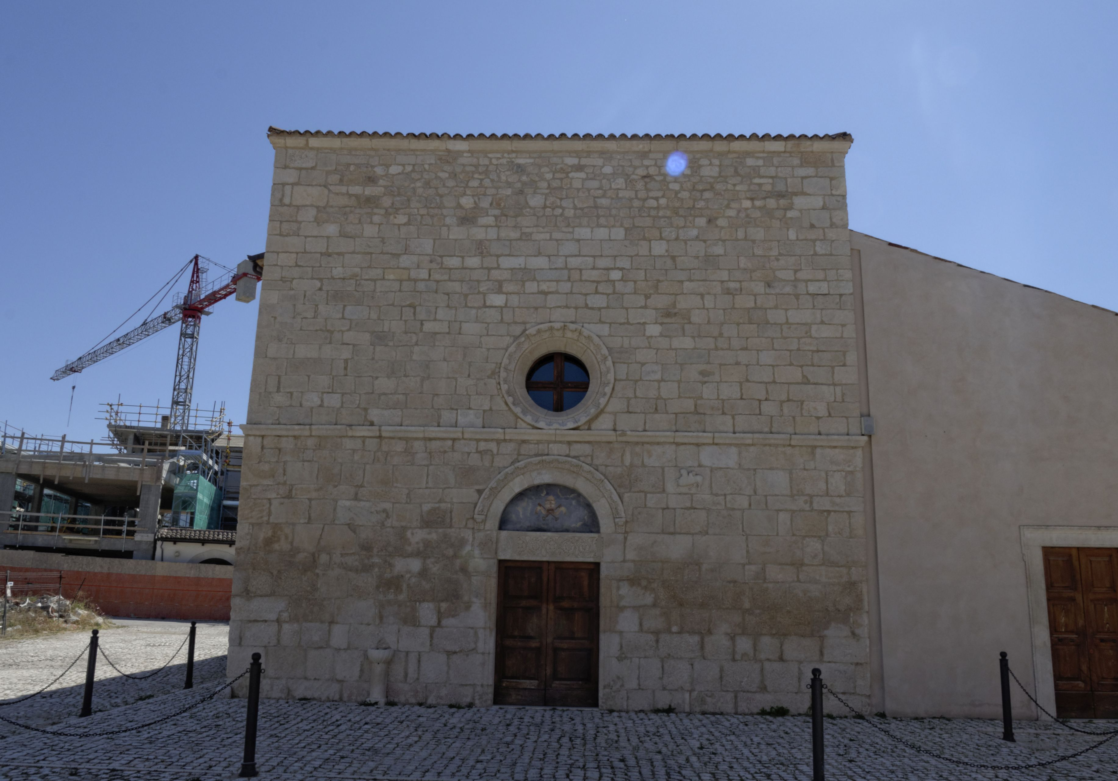 Onna (L’Aquila) 2017 Dieses Foto entstand in Zusammenarbeit mit Stadtbesichtigungen.de Die Seiten Stadtbesichtigungen.de, der dazugehörige Reise Blog sowie die Facebookseite: Stadtbesichtigungen Rom dürfen dieses Bild für Ihre Veröffentlichungen ohne den Hinweis auf Wikipedia, Commons bzw der Lizenz verwenden. Die Verantwortlichen habe von mir (Ra Boe) die Originaldaten zur freien Verfügung übermittelt bekommen.